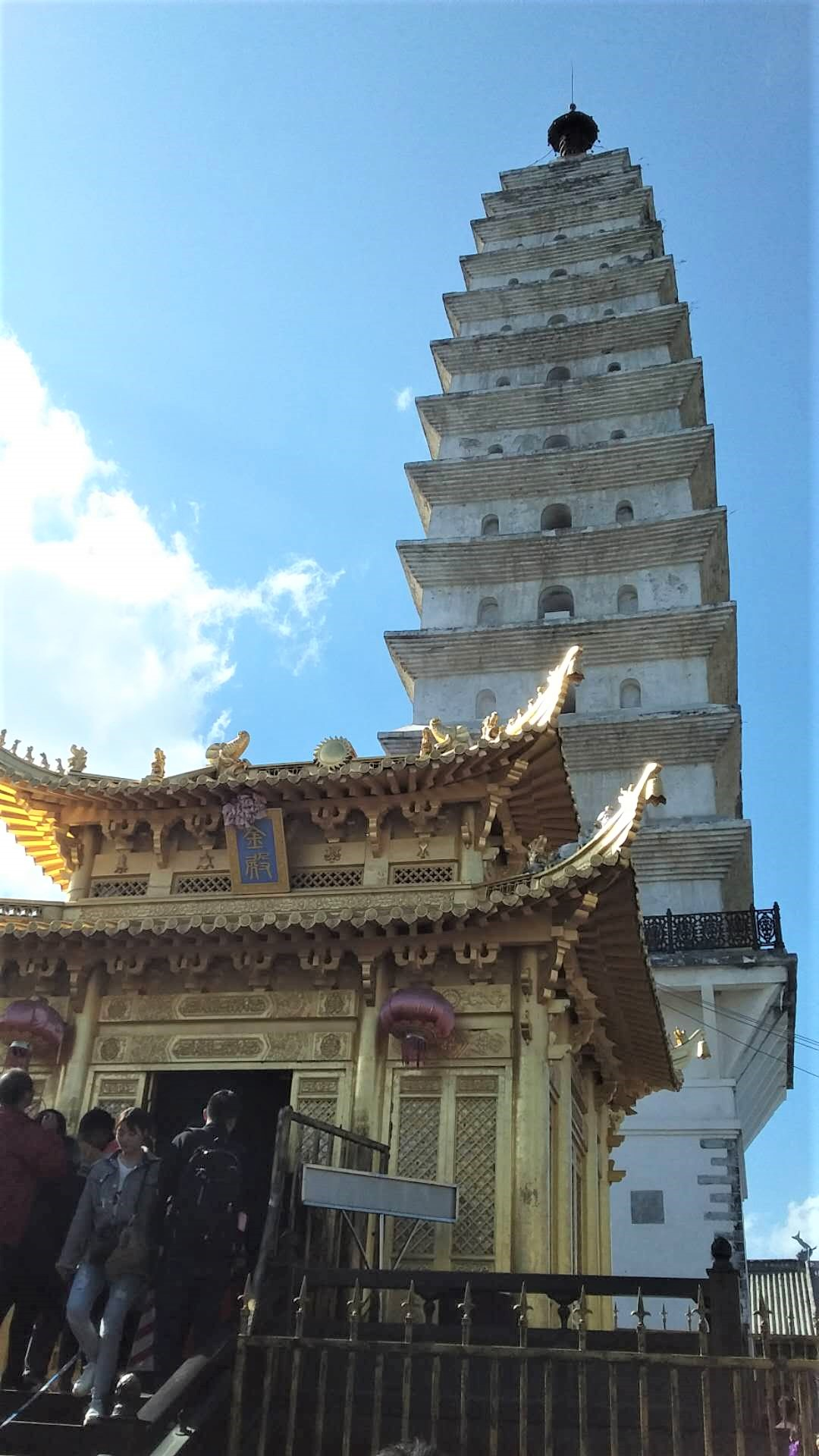 宾川鸡足山金顶寺的金殿和楞严塔。